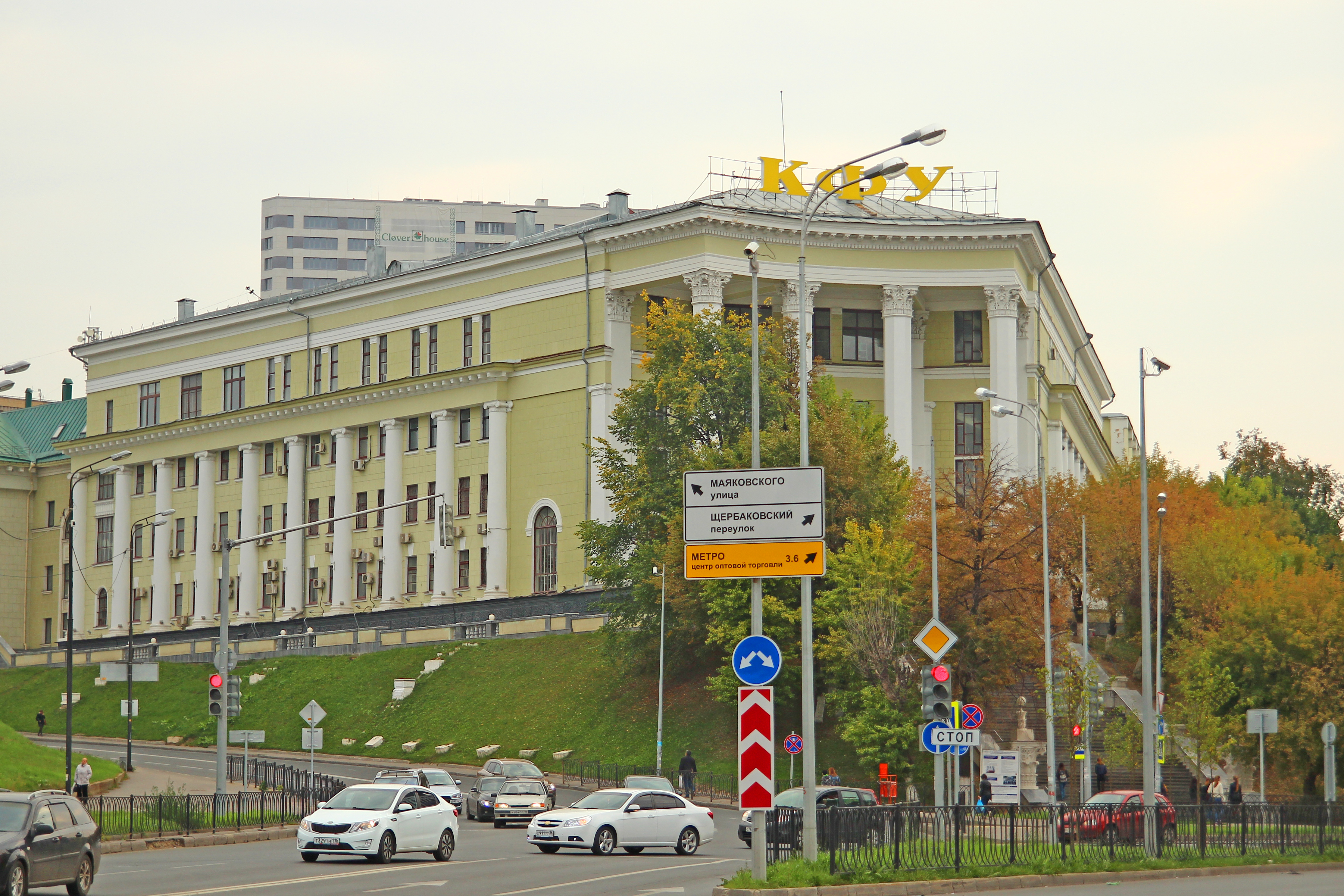 Здание финансово-экономического института (Республика Татарстан, Казань, бутлерова улица, 4)